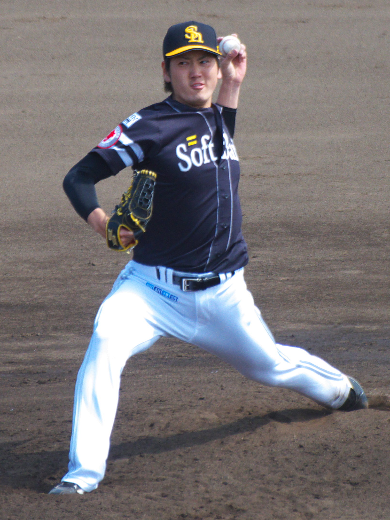 福岡ソフトバンクホークス笠原大芽